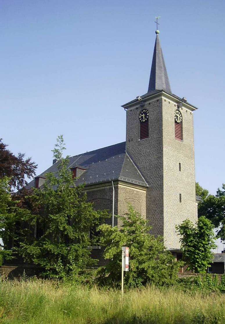 Bildbeschreibung: Linnich-Glimbach, kath. Pfarrkirche St. Agatha